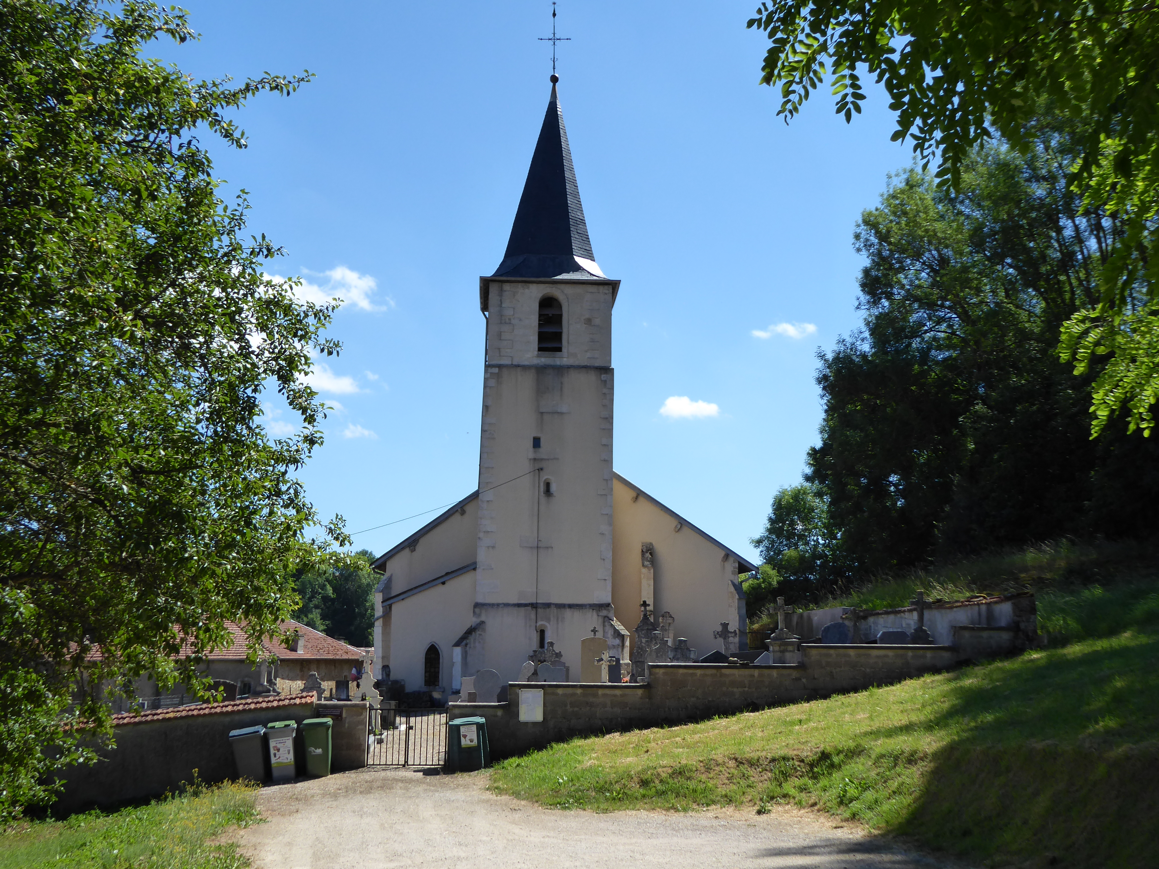 Église Saint-Sulpice vue en arrivant à Aroffe depuis le nord sur la route départementale 29.